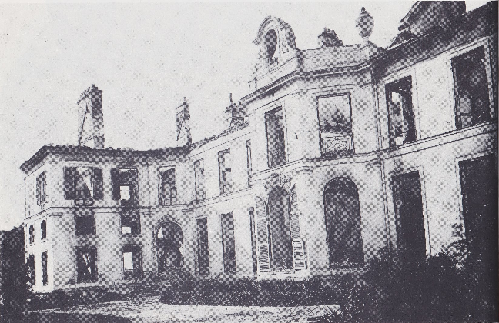 chateau de Bry après le bombardement de novembre 1870